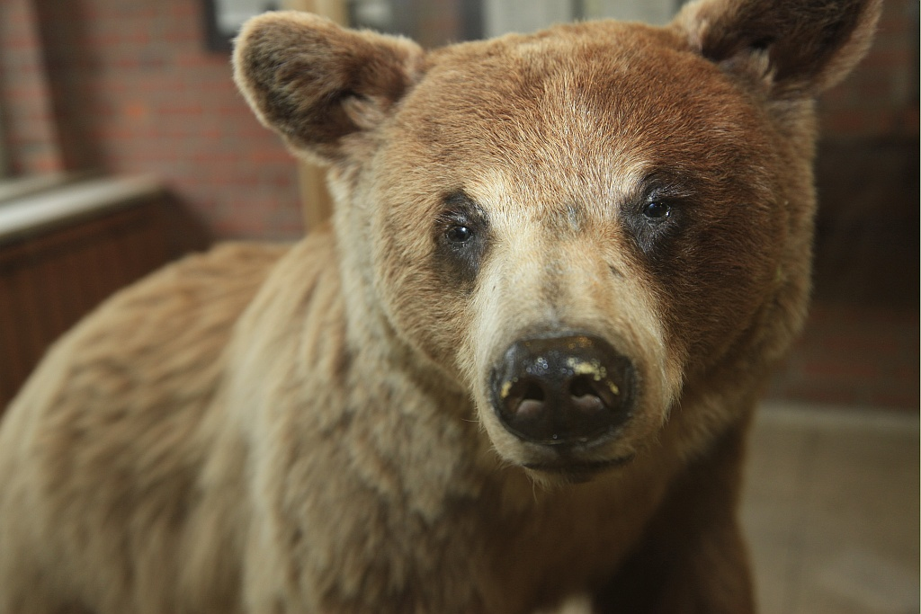 Bär, Wappentier HFlgRgt15